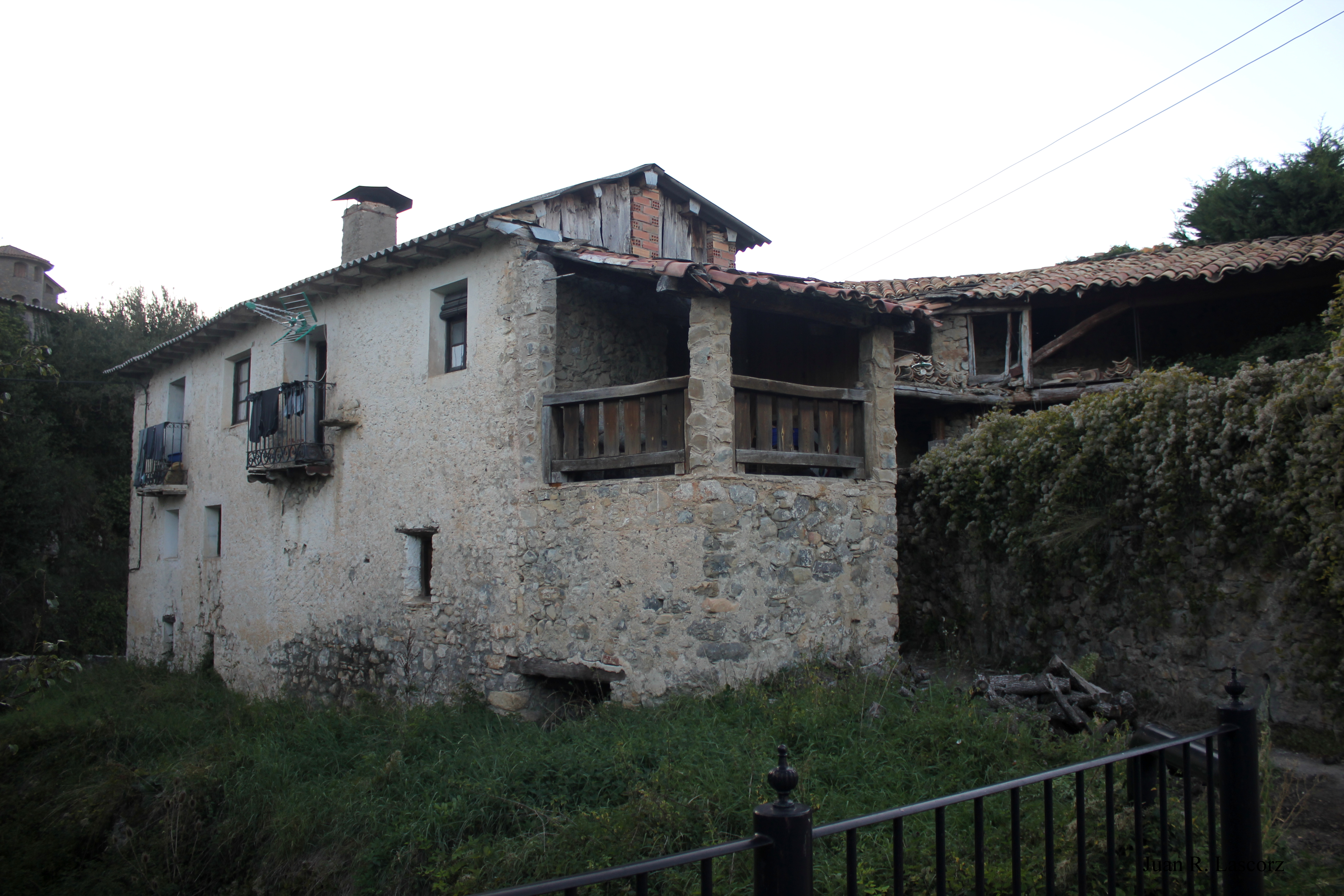 Aragonés: Casa l'Albanyil, en Eixea (Vall de Lierp), Ribagorza, Uesca.